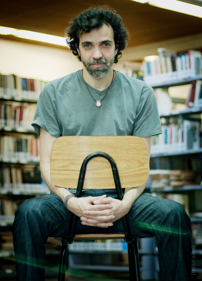 Musico, Fotógrafo, poeta, compositor um Cirurgião Artista.